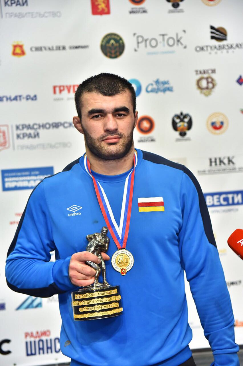 Алан Хугаев на международном турнире гран-при "Иван Ярыгин".